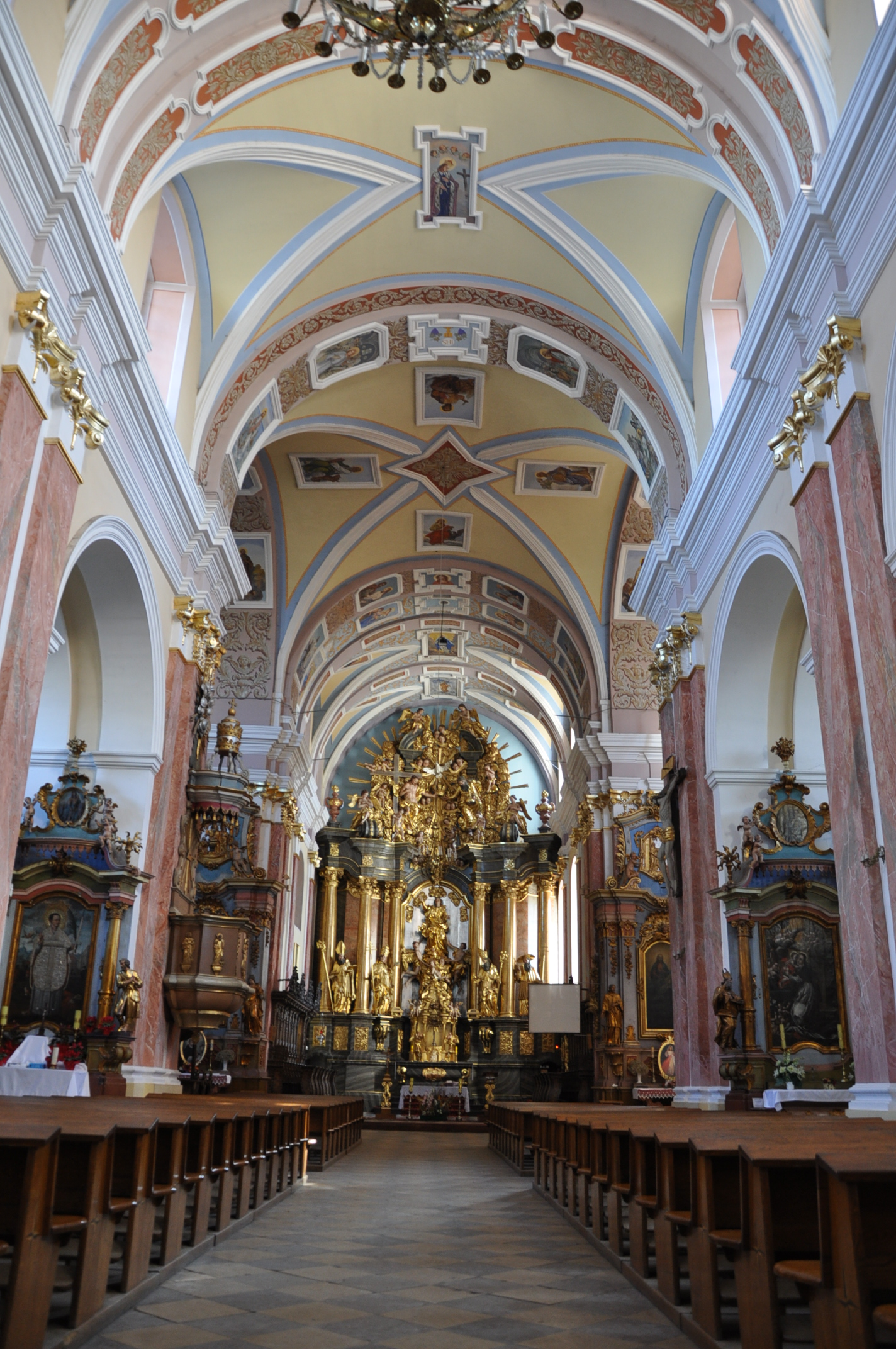 Kościół WNMP w Wancerzowie. Ołtarz.